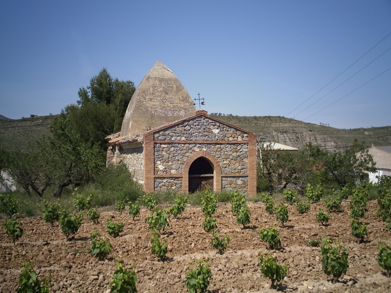 Rincon de Olivedo - La Rioja (Spain) Ermita de San Pedro